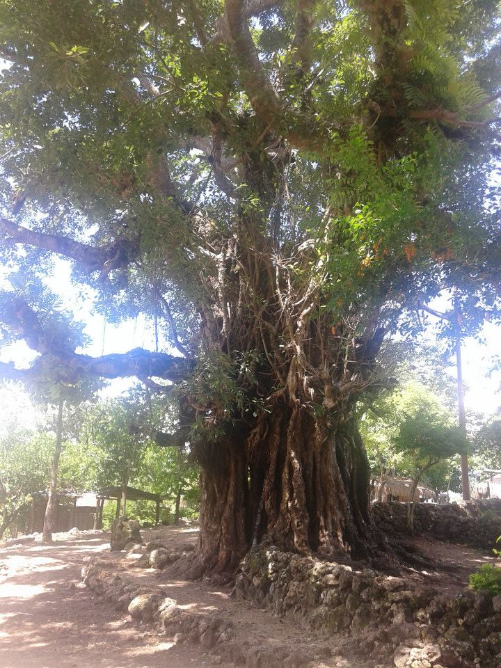 Leohito